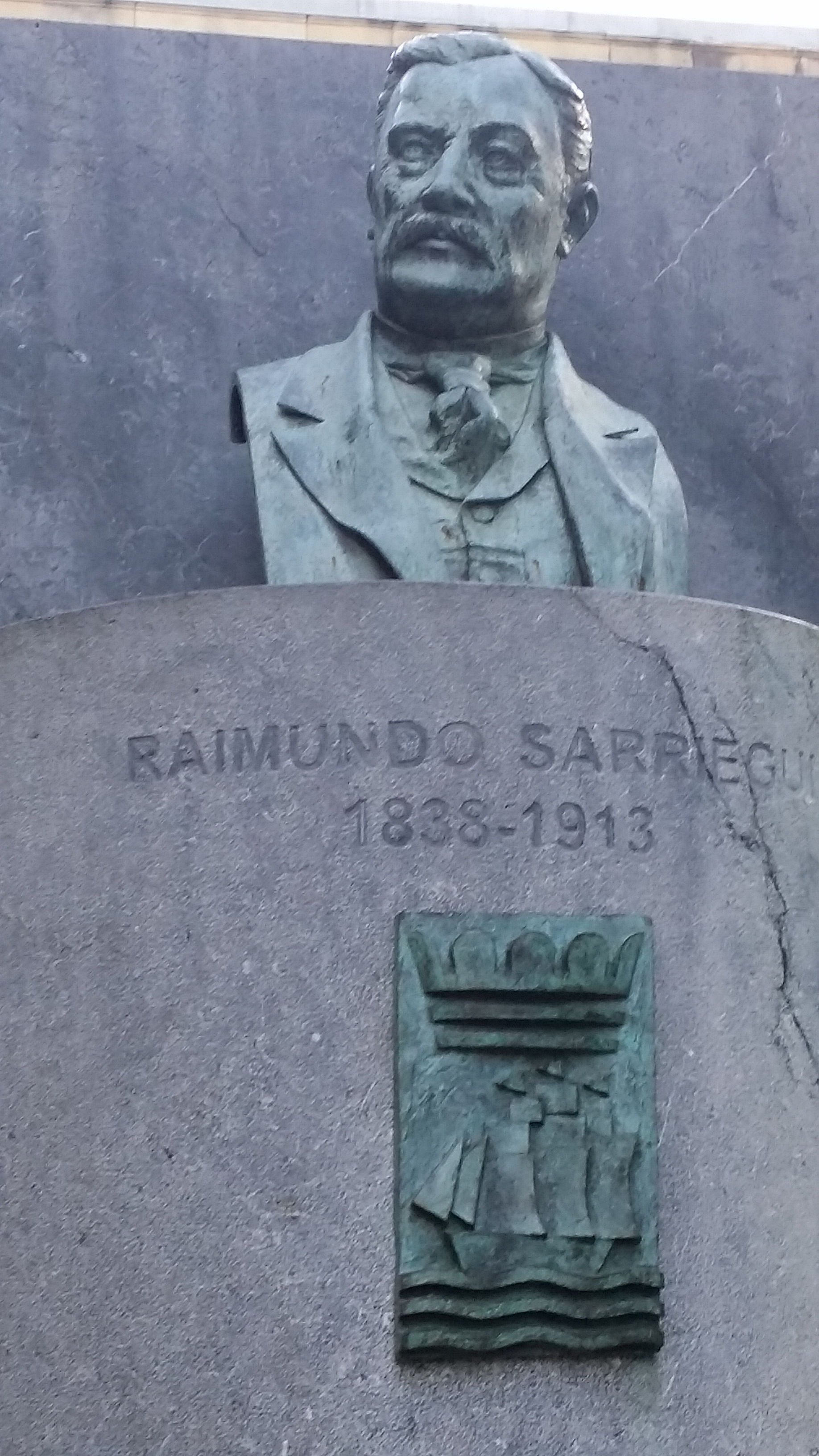 Raimundo Sarriegiren eskultura Donostian